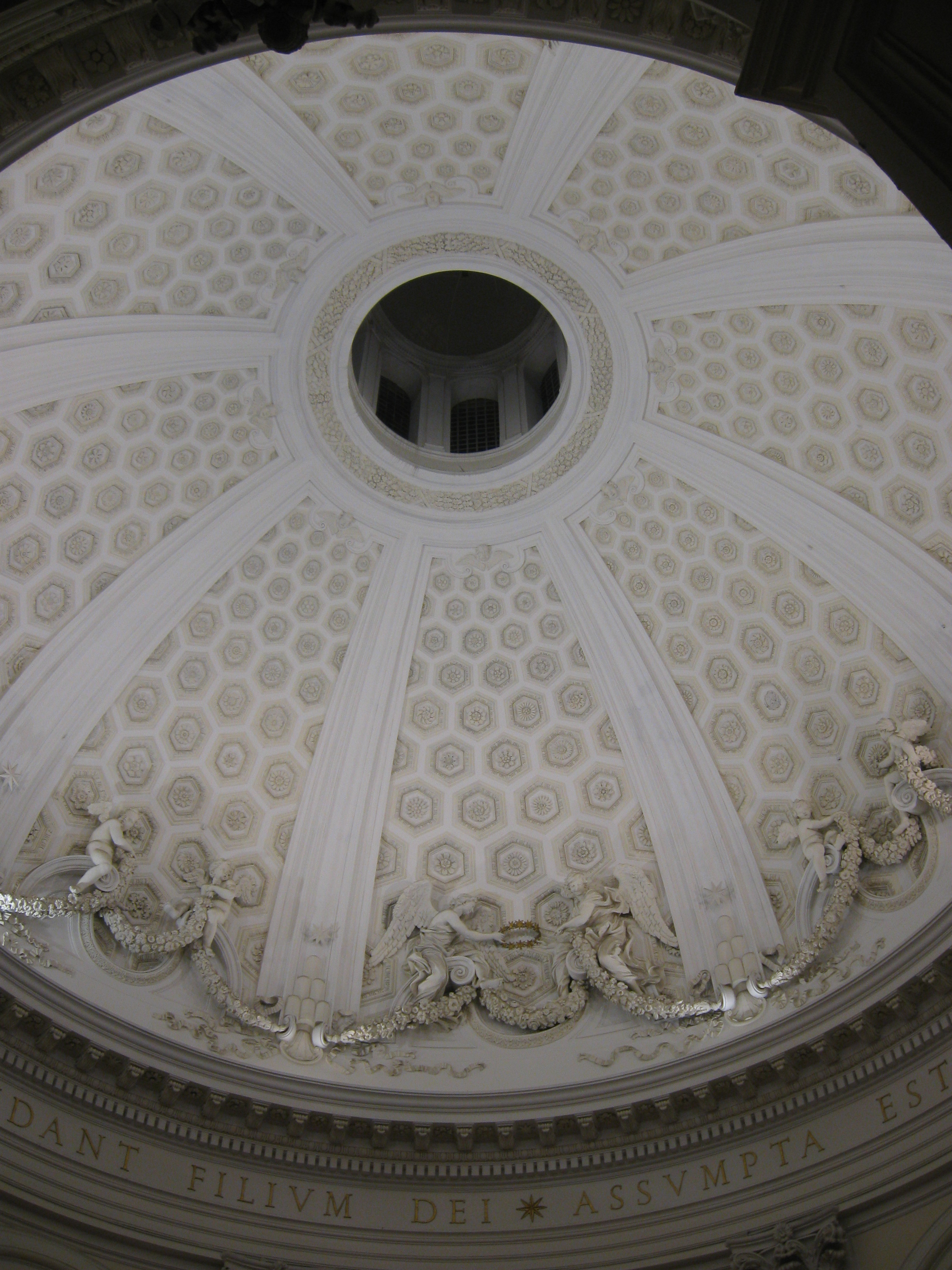 L'interno della cupola della Collegiata di Santa Maria Assunta ad Ariccia (RM)